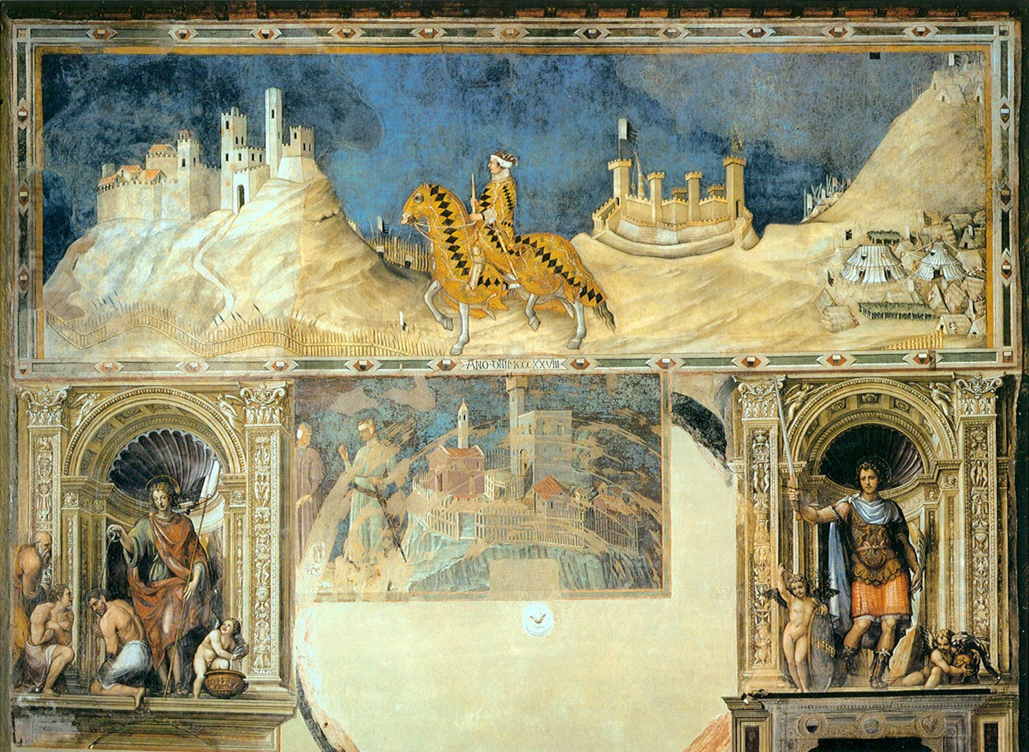 1western-wall-in-palazzo-publico-siena-235.jpg